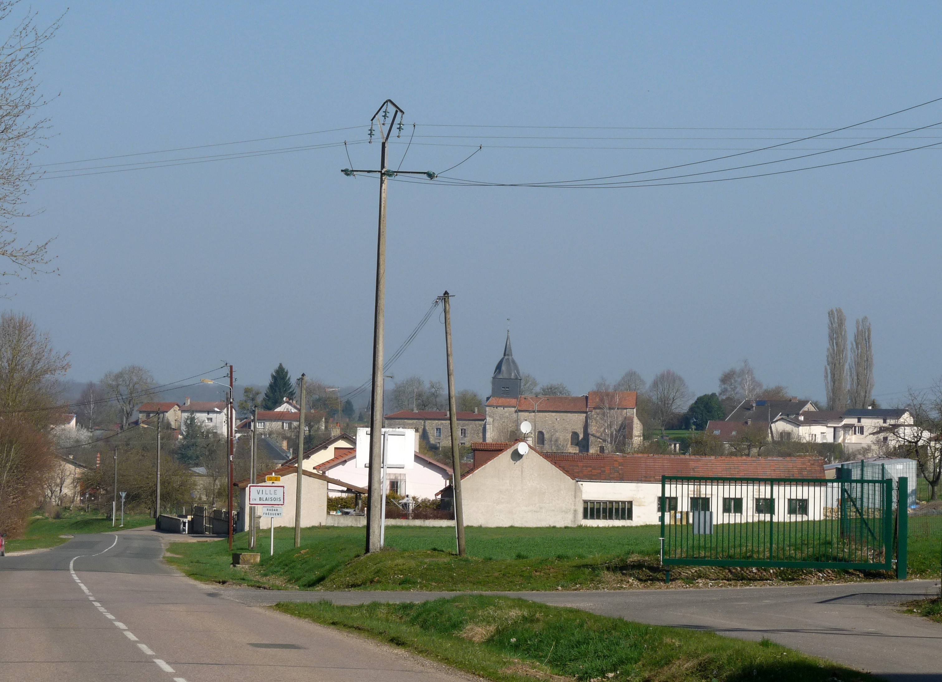 Entrée de Ville-en-Blaisois (Haute-Marne).